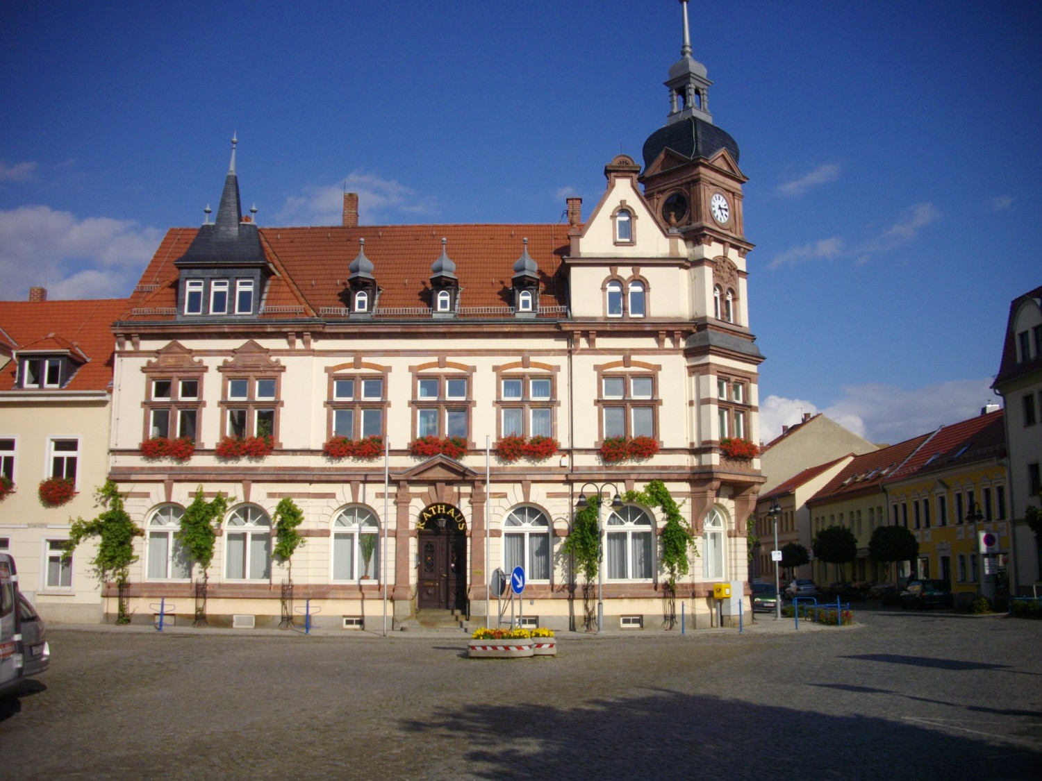 Groitzsch, Rathaus vom Marktplatz aus betrachtet